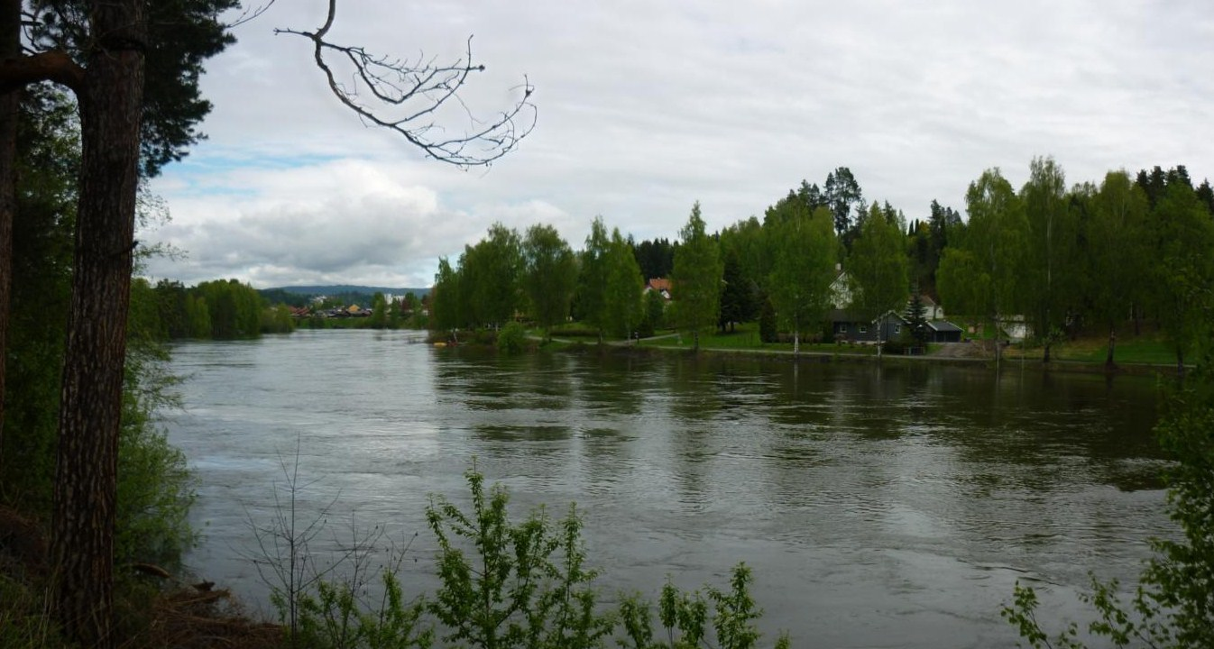 Storelva ved Støalandet, Ringerike kommune, Buskerud